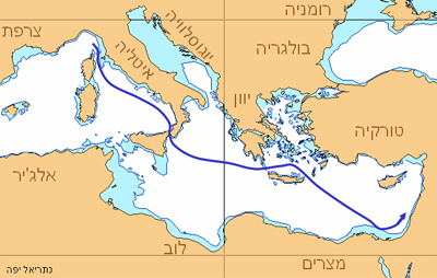 אוניית המעפילים כתריאל יפה - מסלול